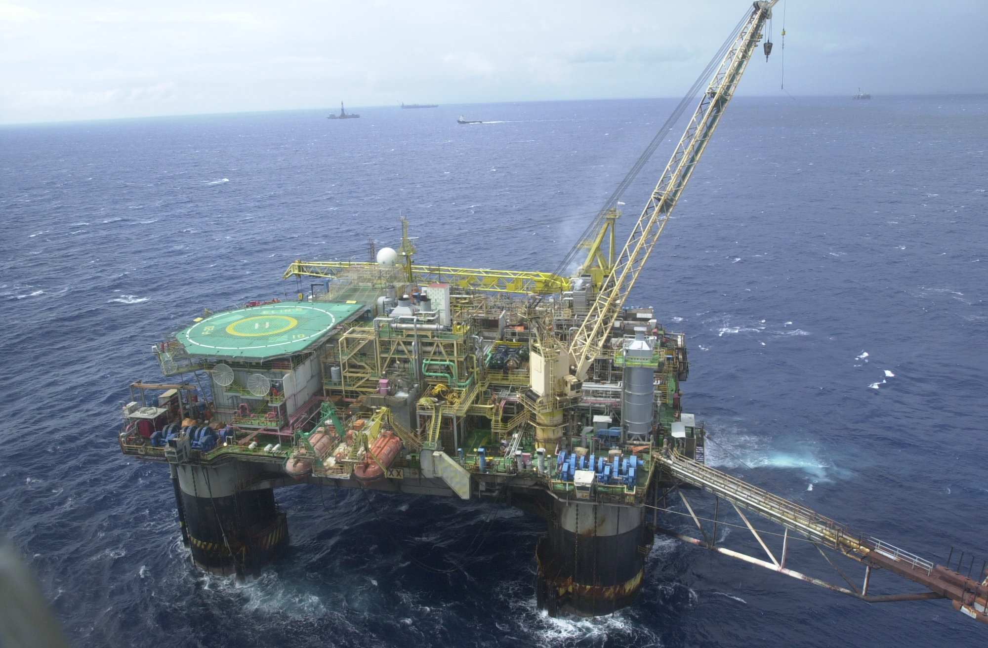 Brasília - Apesar da crise financeira internacional e do conseqüente adiamento da divulgação do Plano de Negócios da Petrobras para o período 2009/2013, a estatal pretende manter o ritmo de investimento, contratando, construindo e colocando em produção 20 plataformas nos próximos anos.